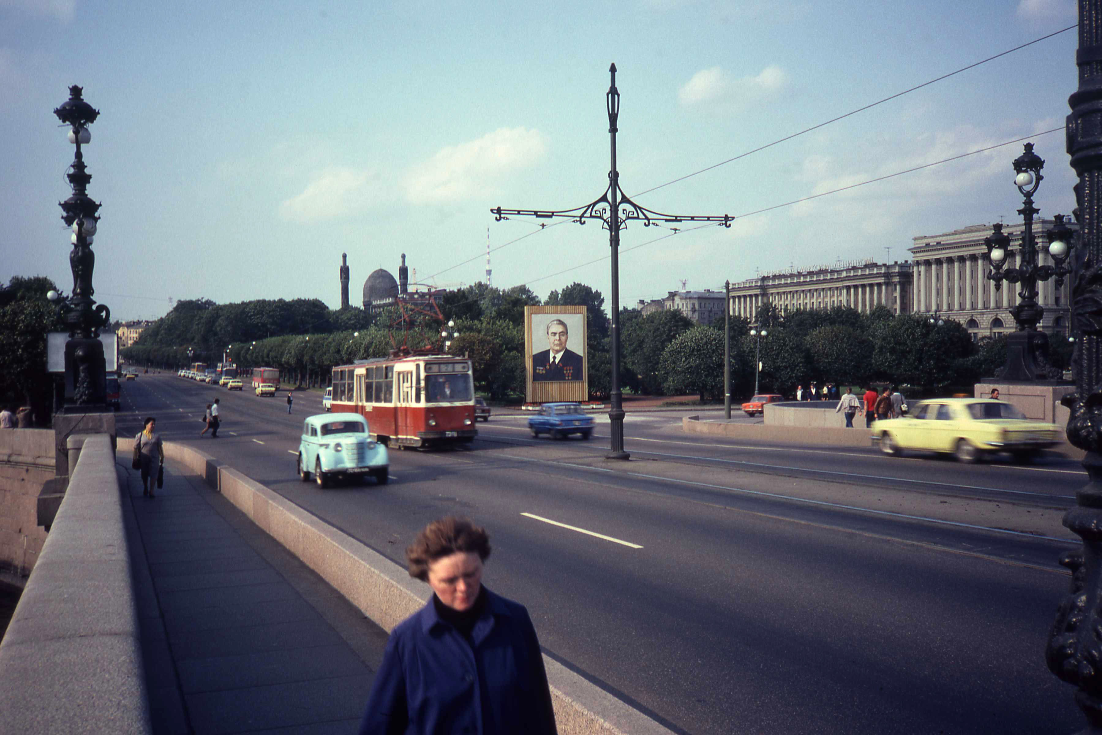 Tramlijn 2 over een brug in Sint-Petersburg met een bord van Breznev op de achtergrond in 1982.